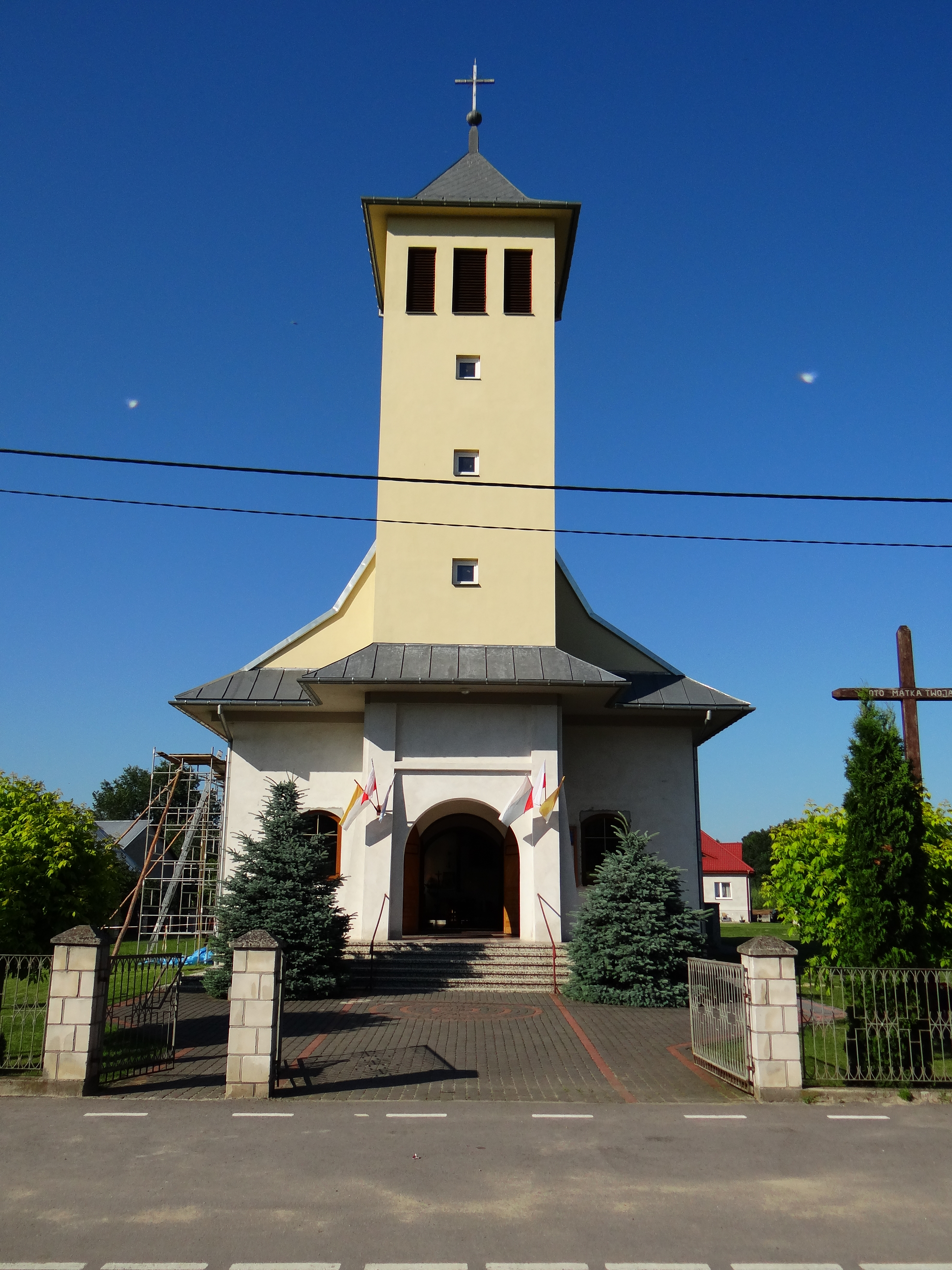 Zdjęcie wykonane w miejscowości Bystre, powiat niżański.